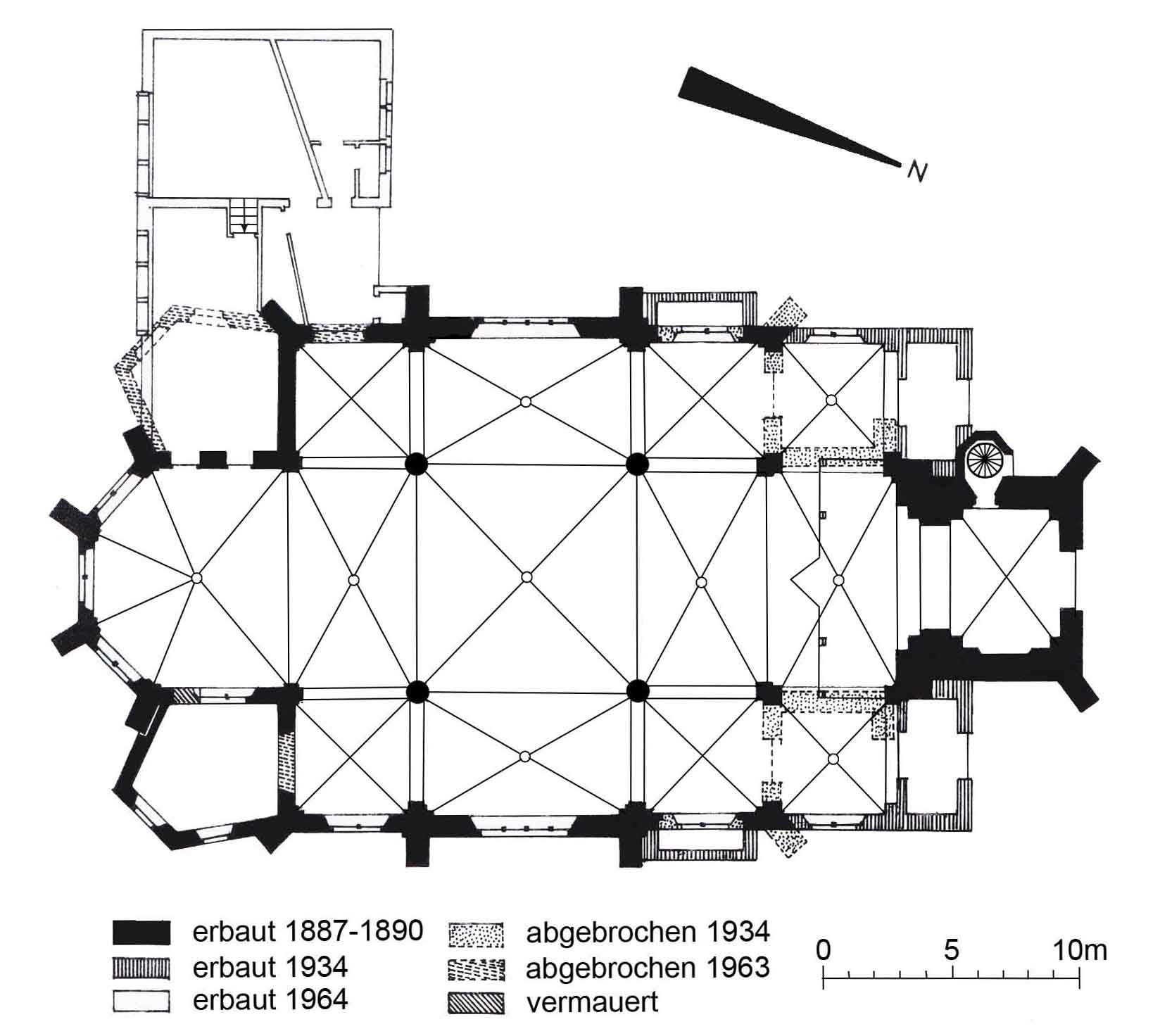 Grundriss Pfarrkirche St. Johannes Baptist (Mesum), Rudolf Breuing, Rheine Gestern-Heute-Morgen, Band 25 (1/90, S.57)